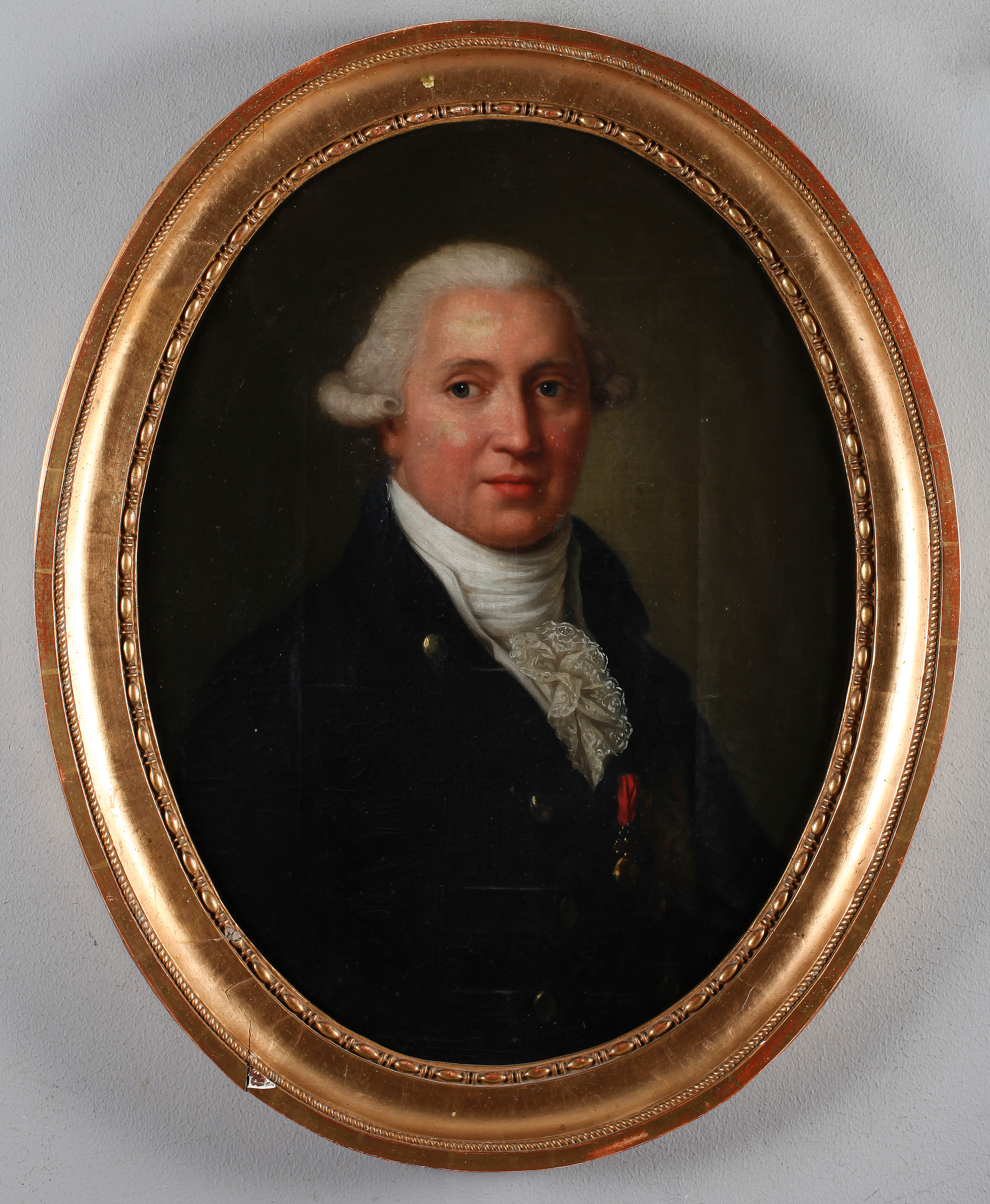 Konung Anton av Sachsen (1755-1836)